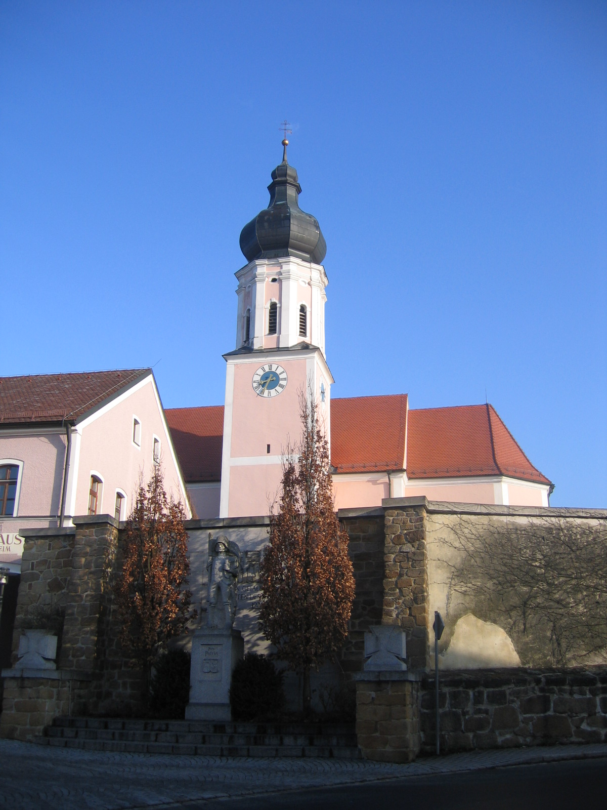 Außenansicht der Pfarrkirche St. Michael zu Neukirchen-Balbini